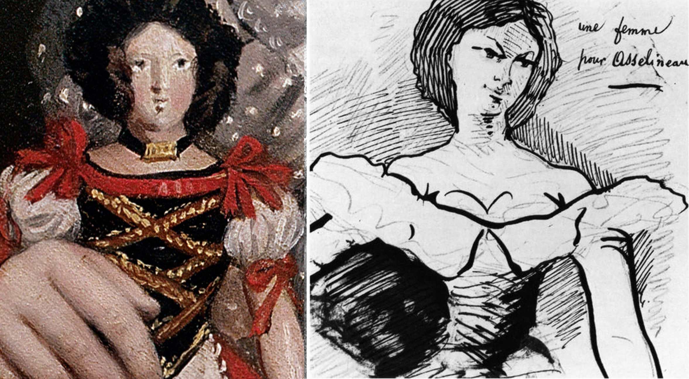 " La Poupée " de Théodore Chassériau et " Une femme pour Asselineau " de Charles Baudelaire (Dessin de Charles Baudelaire dédié à son ami Charles Asselineau et reproduit page 37 du " Baudelaire par lui-même ", Seuil, 1952, présenté par Pascal Pia, ainsi que dans Charles Baudelaire, Seghers n° 31, 1963, par Luc Decaunes, page 111)